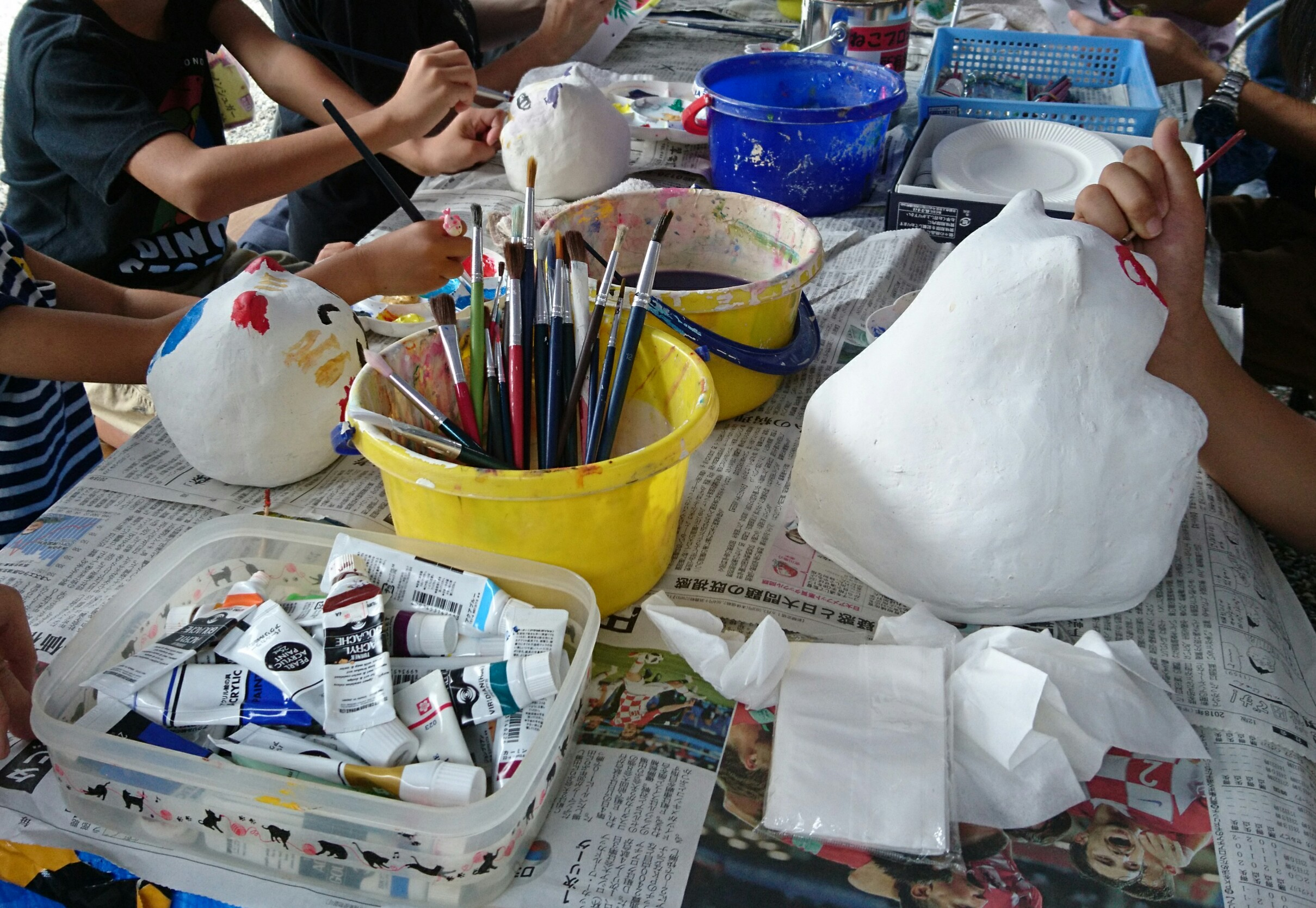 陶製素焼きこまねこの絵付けワークショップ